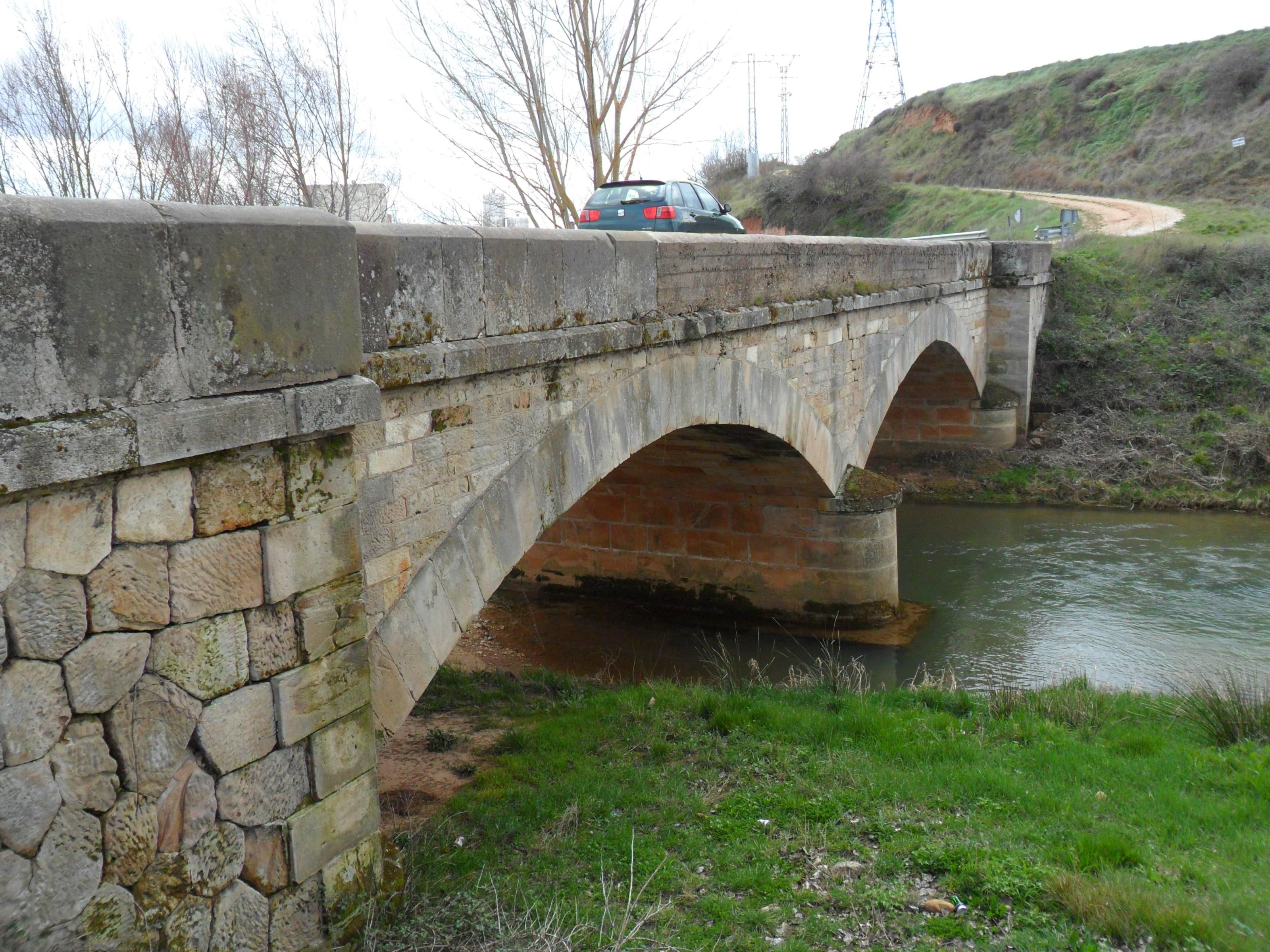 Puente sobre el río Burejo.